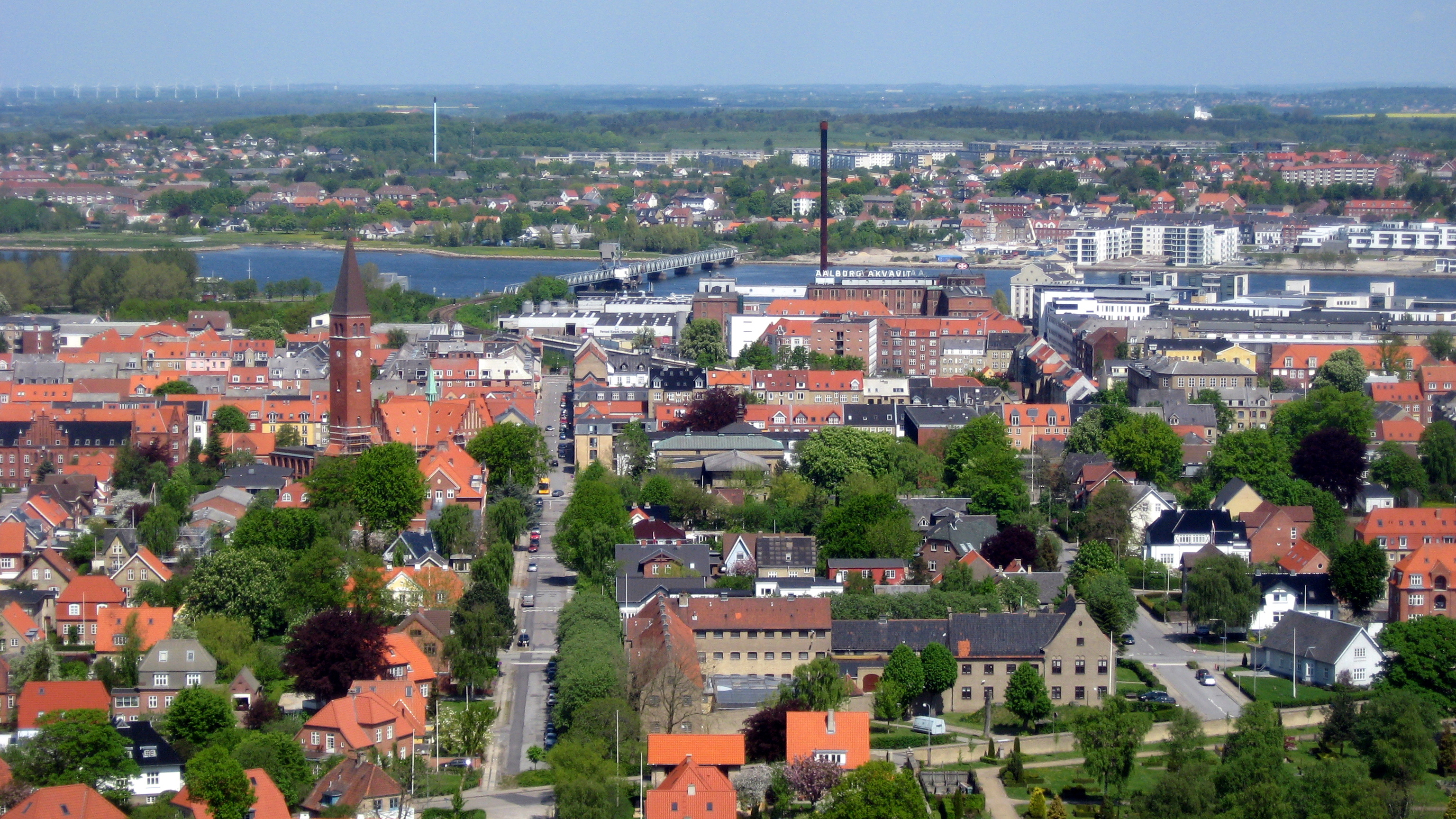 Aalborg